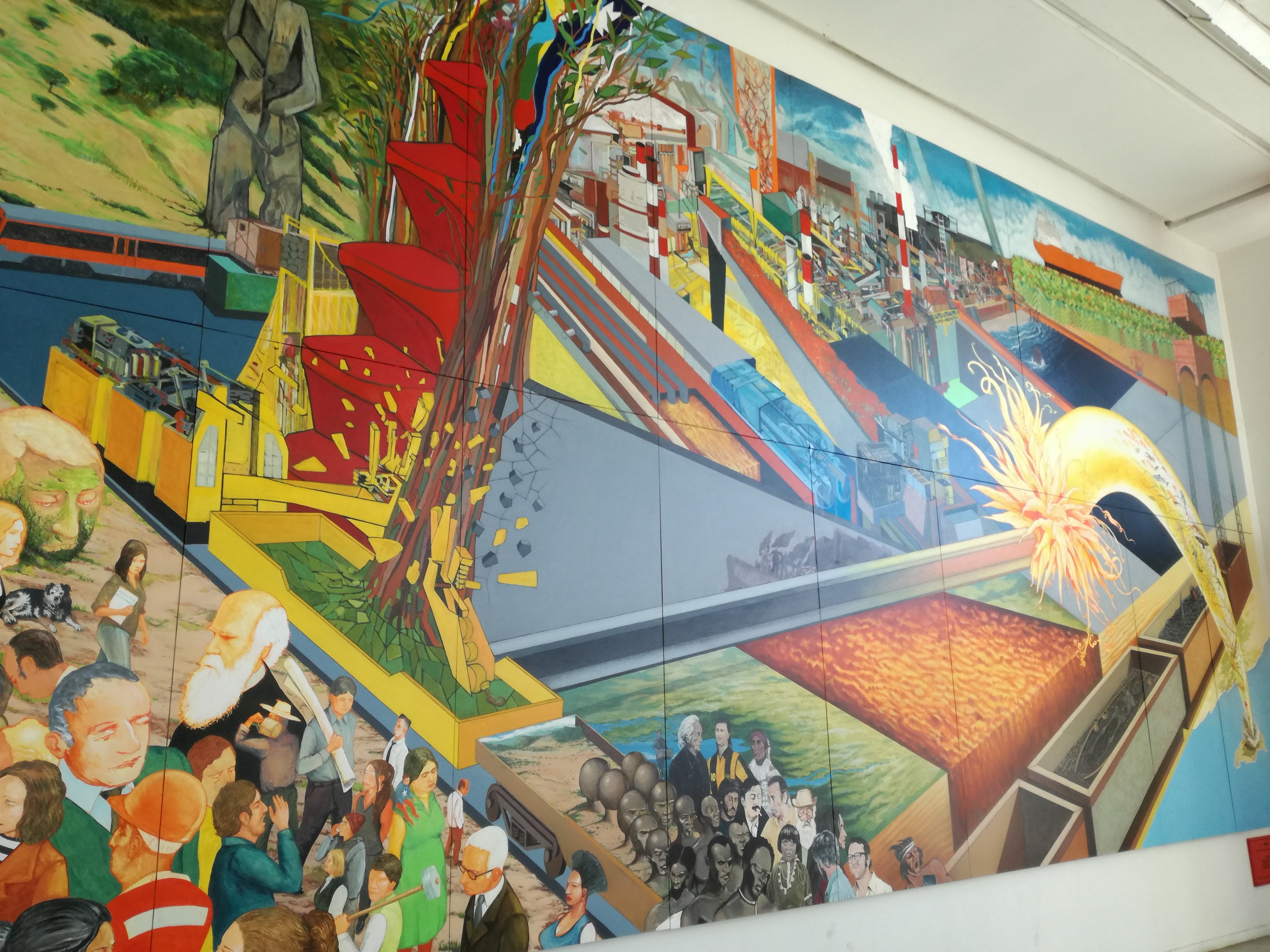 Mural en la estación El Arenal de Talcahuano (Chile) Línea de Biotrén (antes ferrocarril)